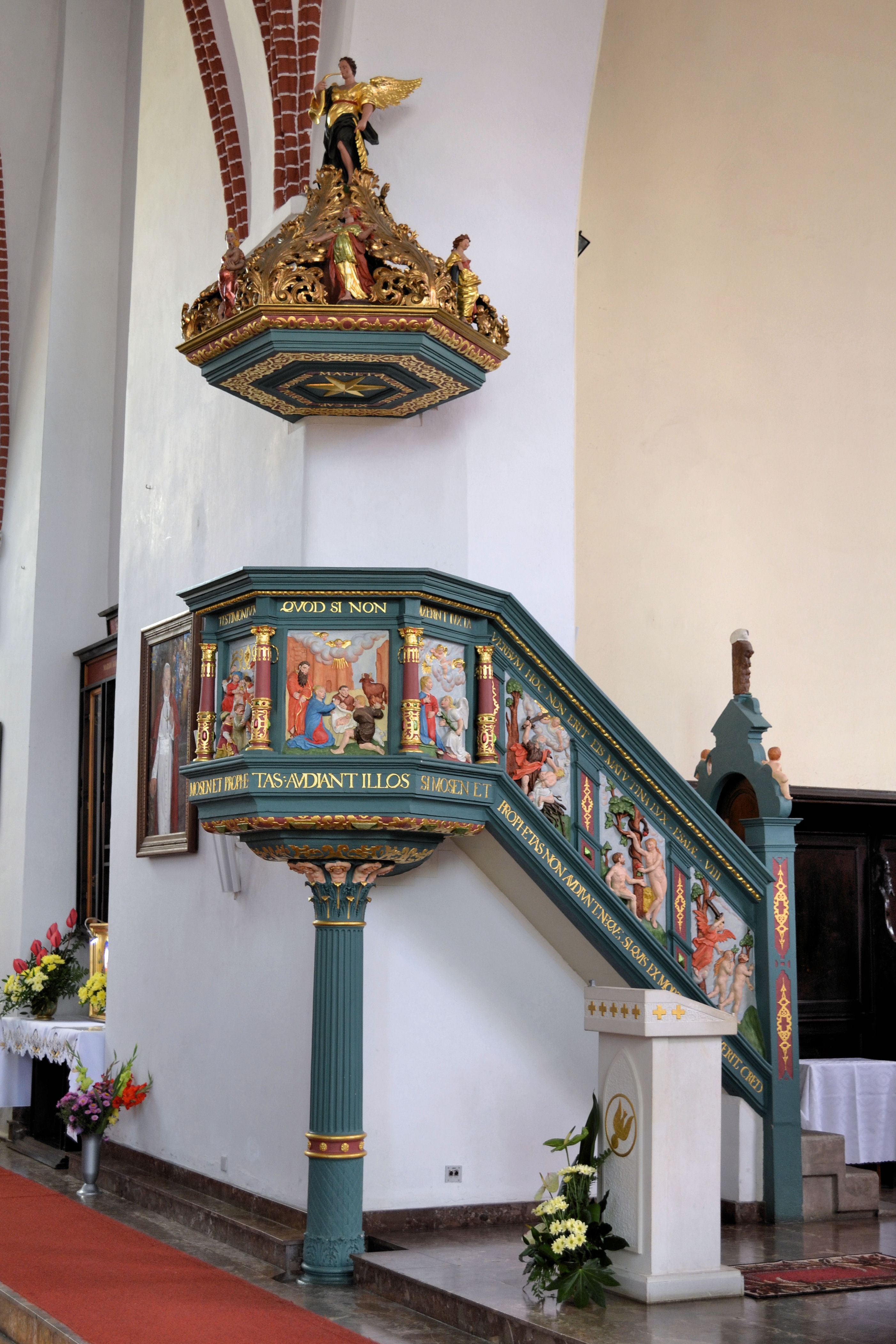 Kościół Narodzenia Najświętszej Maryi Panny w Gryfinie